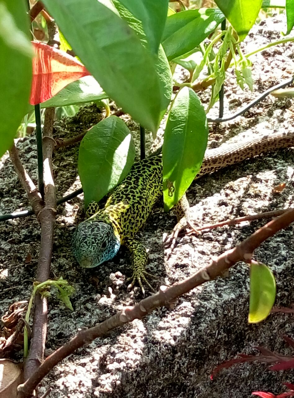 Lagarto das silvas en celo tomando o sol